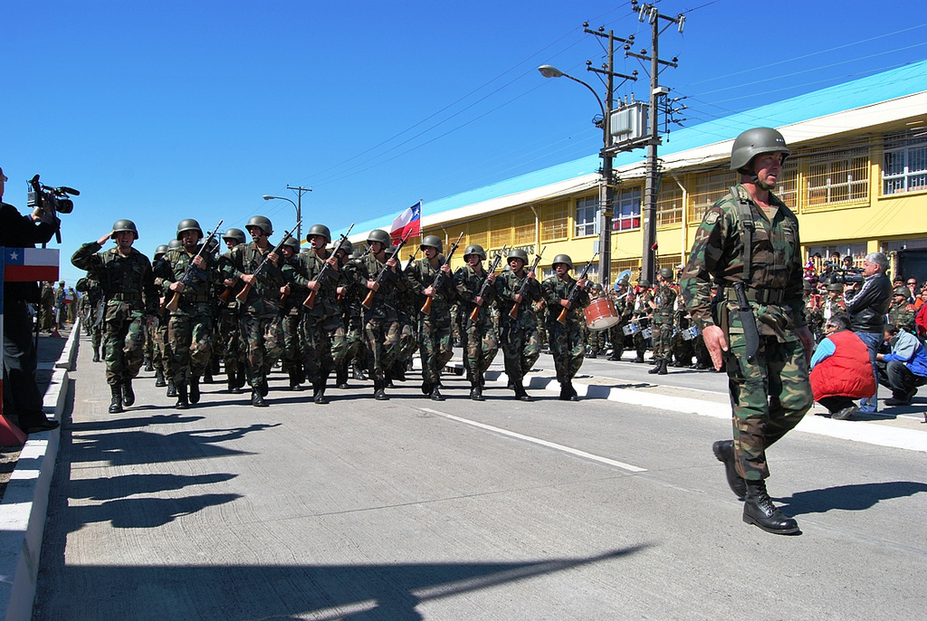 Con Te Deum y desfile Talcahuano celebró el Bicentenario de Chile